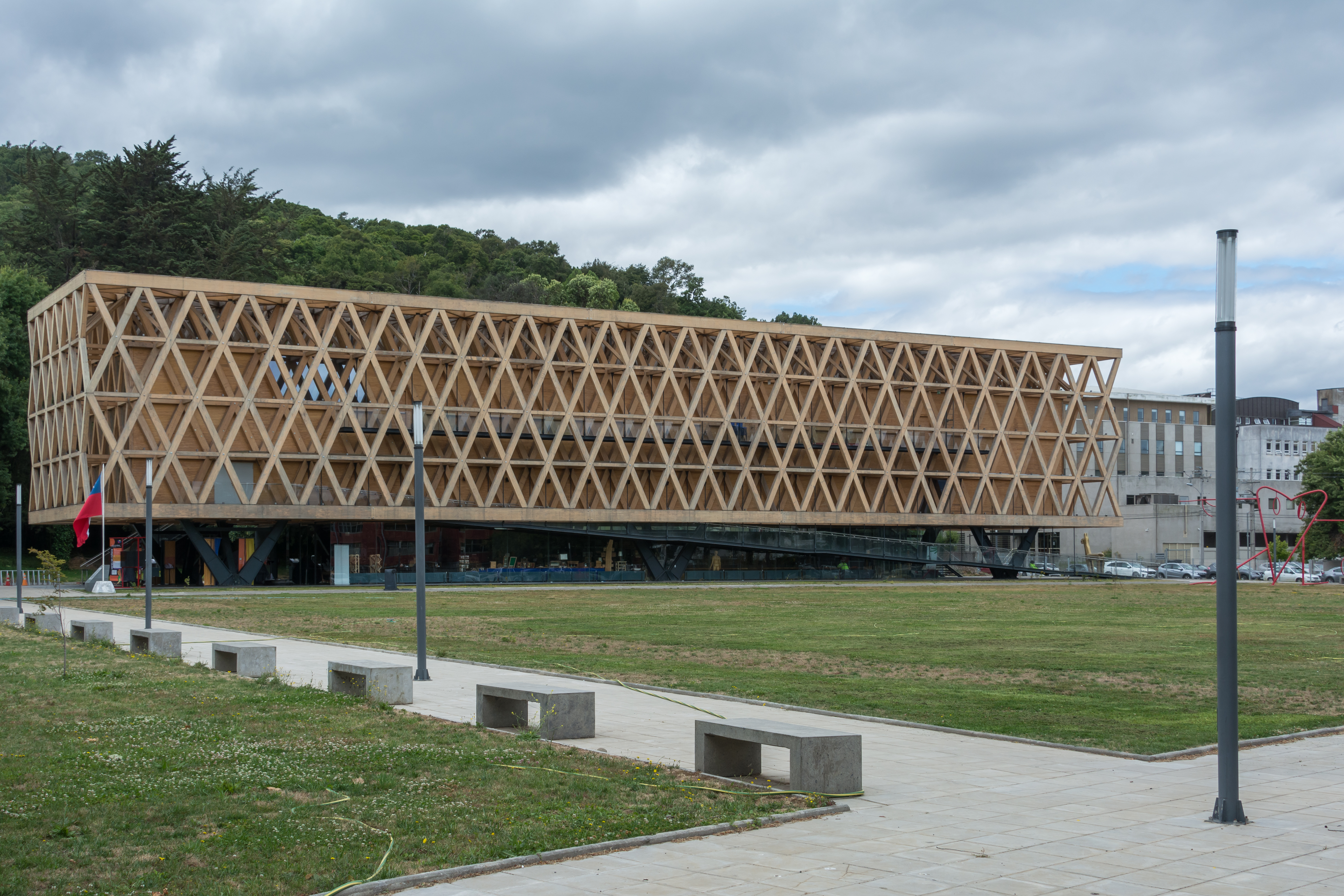 Pabellón El Amor de Chile, Temuco, Región de la Araucanía, Chile.